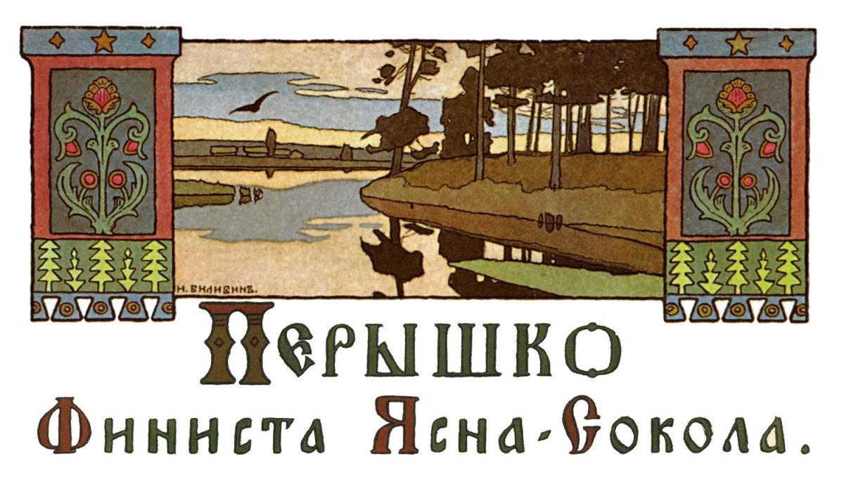 заставка к сказке перышко финист